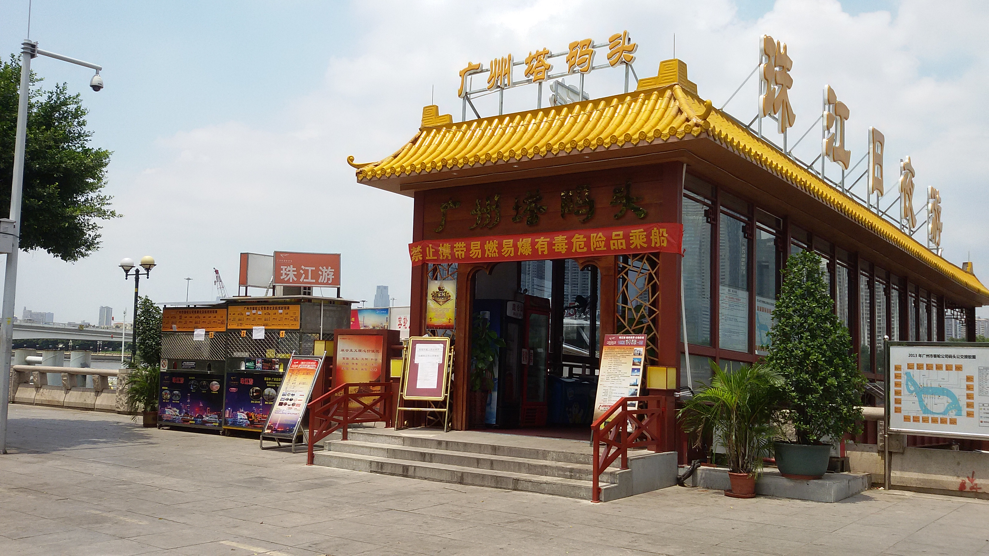 粵語: 廣州塔碼頭